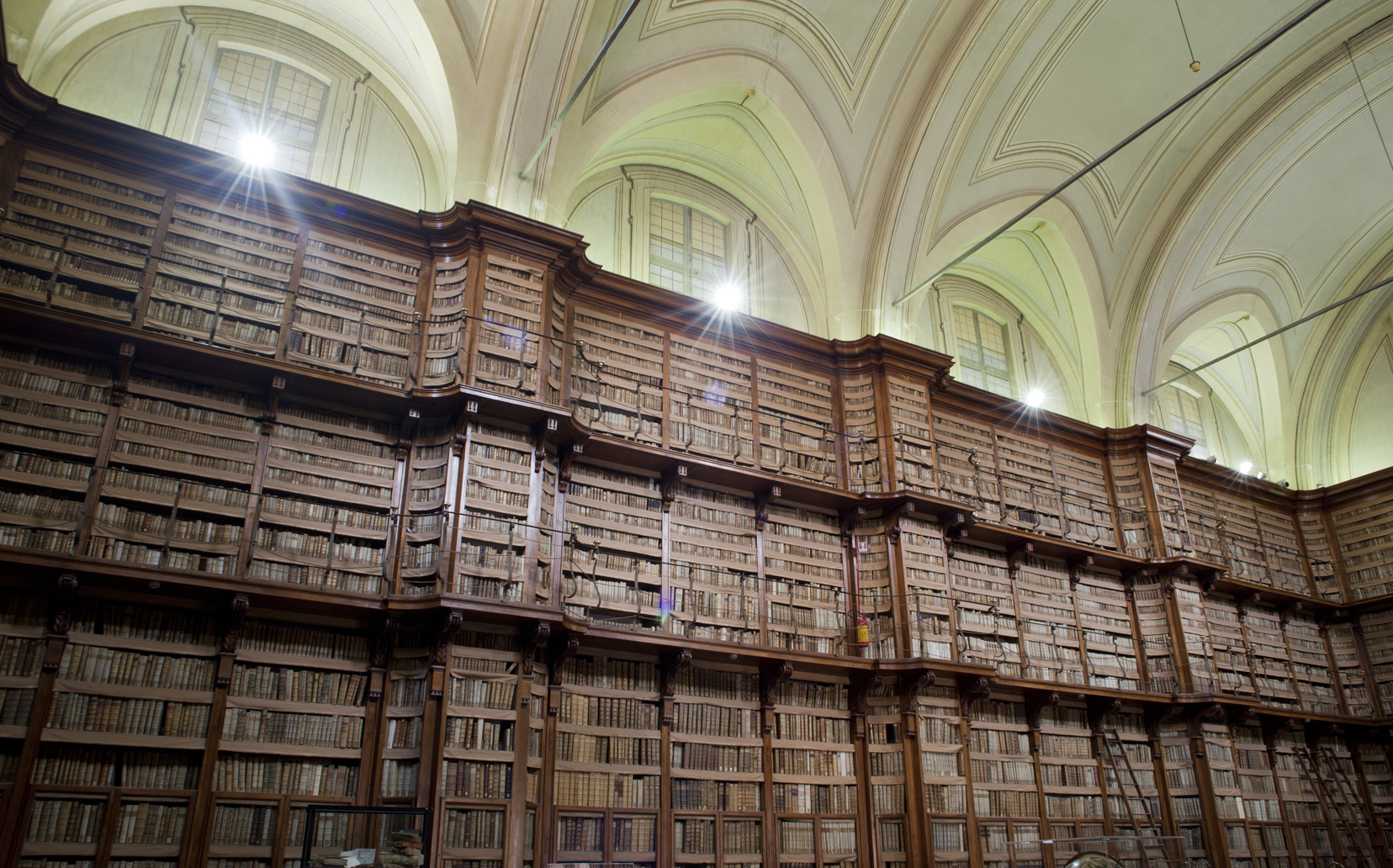 Biblioteca Angelica - MIBAC This is a photo of a monument which is part of cultural heritage of Italy.